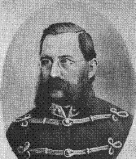 Ivan Branislav Zoch older